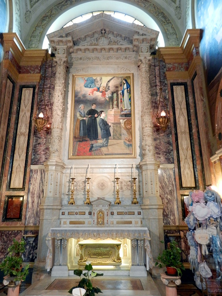 Torino - Altare con la tomba di S. Domenico Savio all'interno del Santuario di S. Maria Ausiliatrice